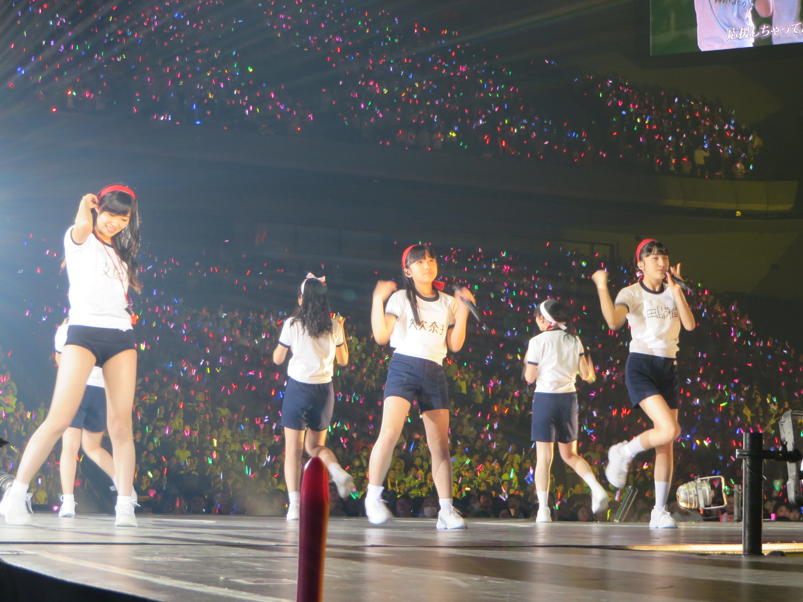 コンサート会場で振られているペンライト